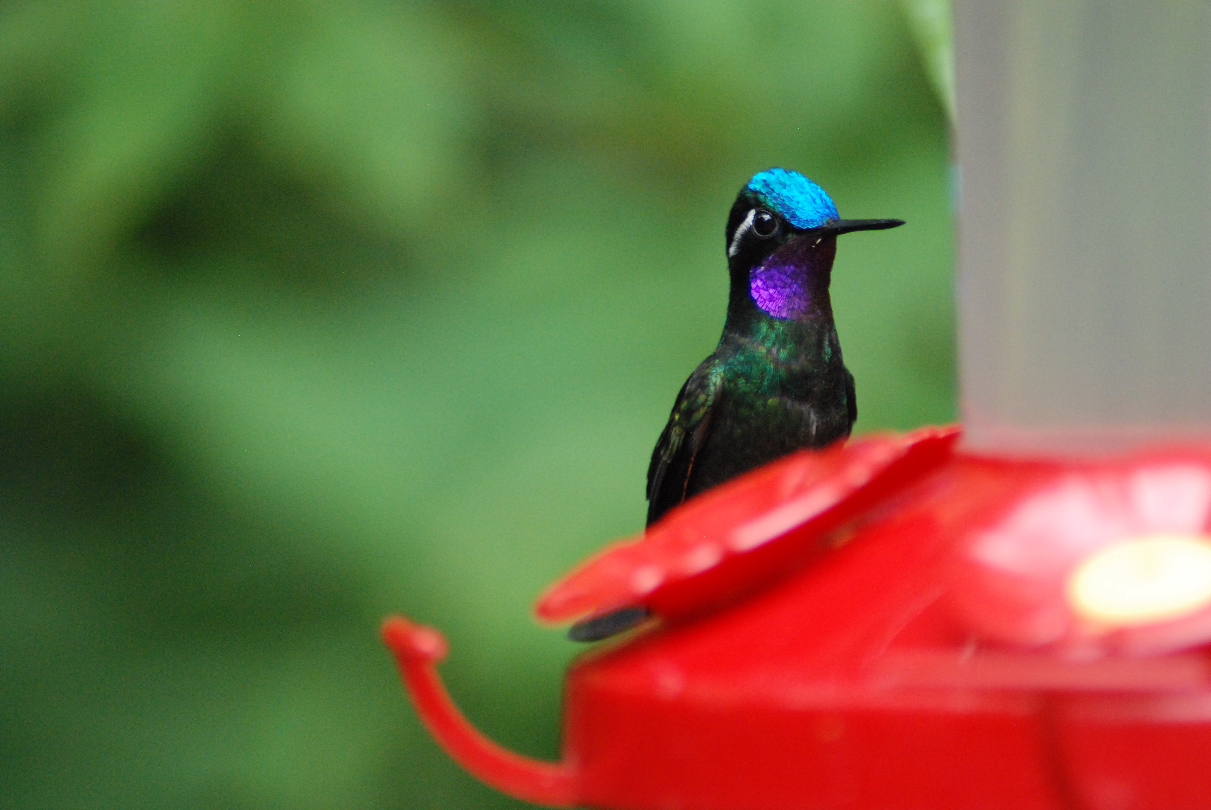 Male Lampornis calolaemus from Monteverde (Costa Rica).